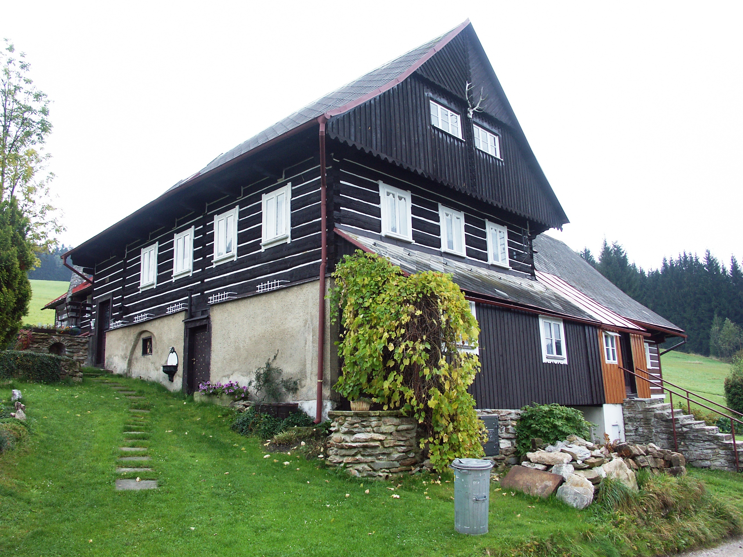 Das Grundstück Alt-Niederrochlitz 103 und 101 diente den Gerichtsherren als Wohnung und Gerichtstelle (Kretscham)